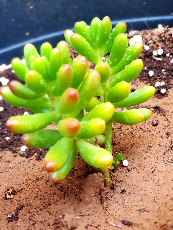 Sedum rubrotinctum